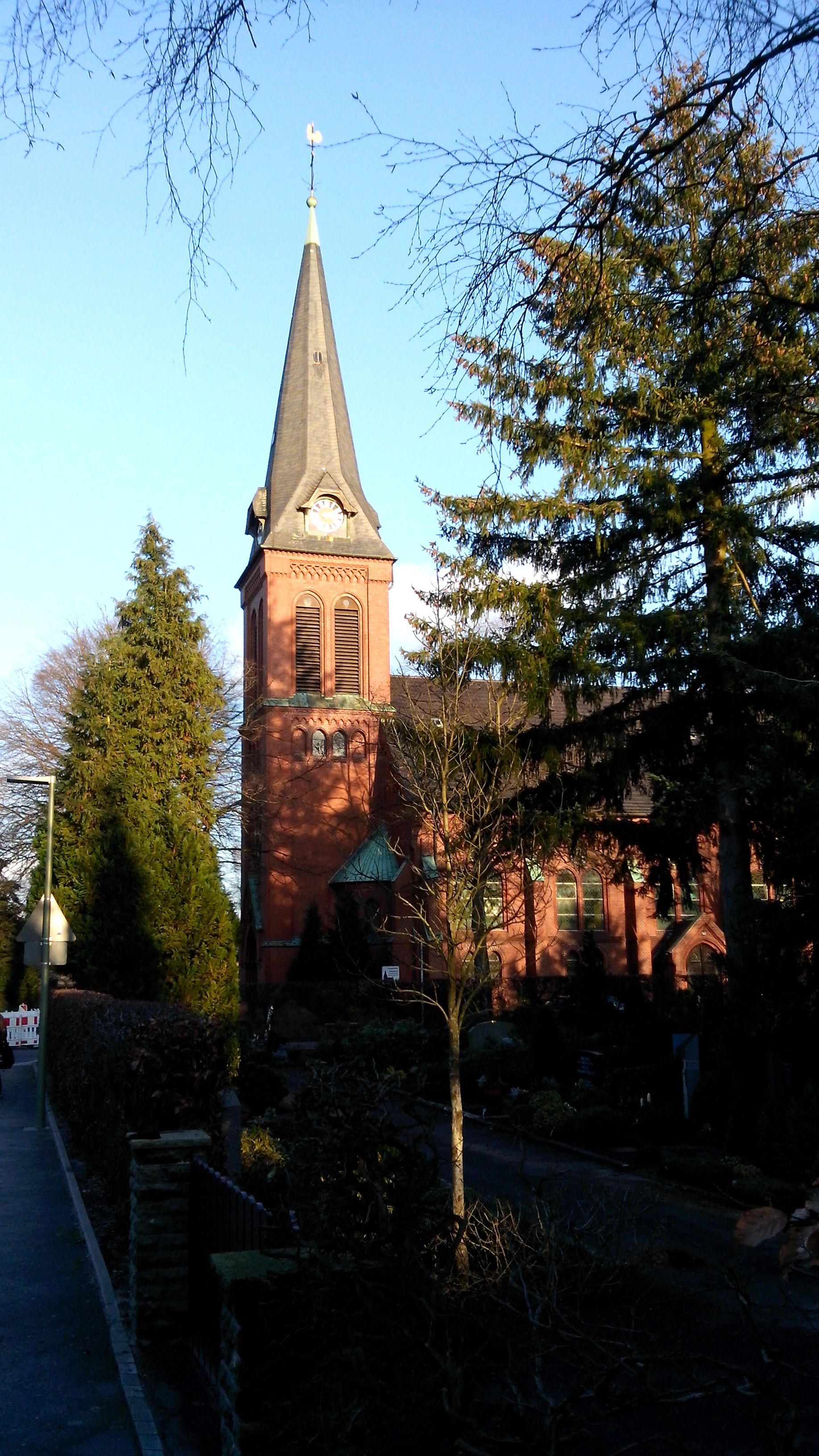 Turm der Evangelischen Kirche im Bielefelder Stadtteil Ummeln von Süden aus.